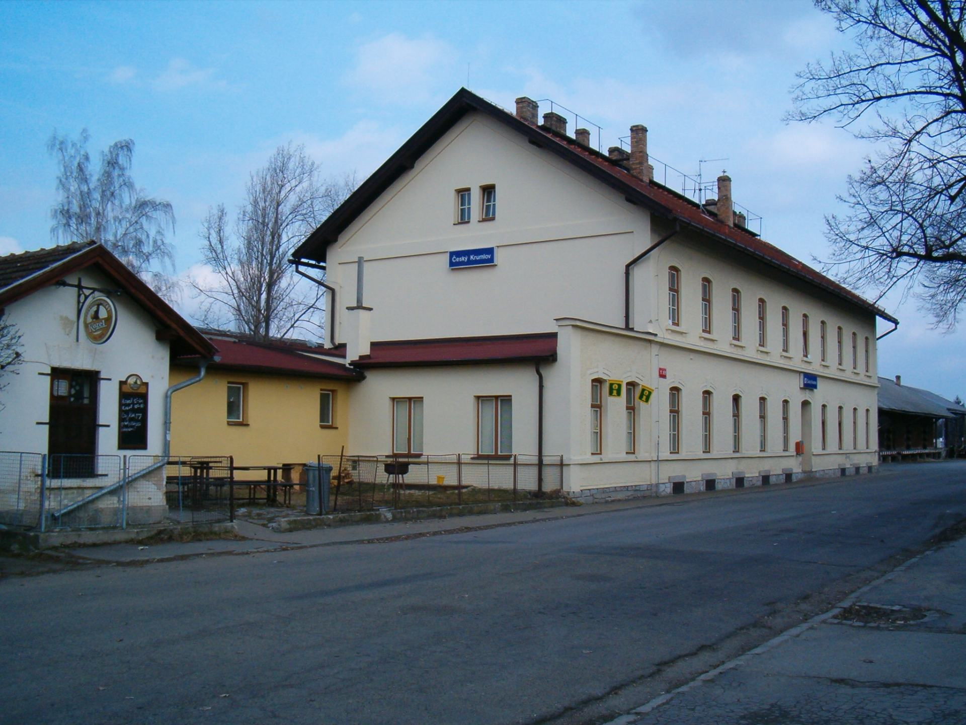 Český Krumlov - nádraží ČD